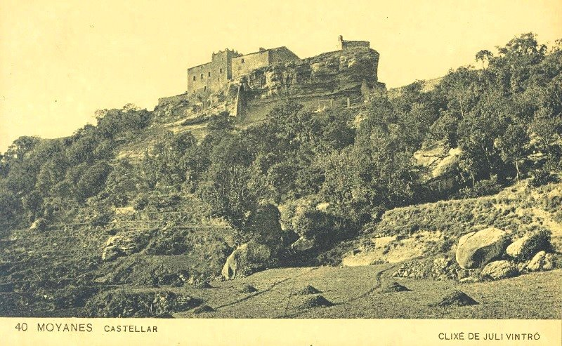 Fotografia obtinguda abans del 1911, data de la mort del fotògraf, Juli Vintró. Escanejada per Gustau Erill i Pinyot a partir d'una postal antiga. Castell de Castellcir (Moianès)